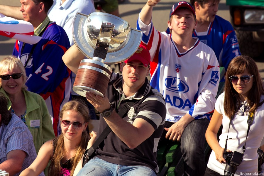 Кубок чемпионов мира по хоккею в руках Алексея Емелина. День города Тольятти. 2012